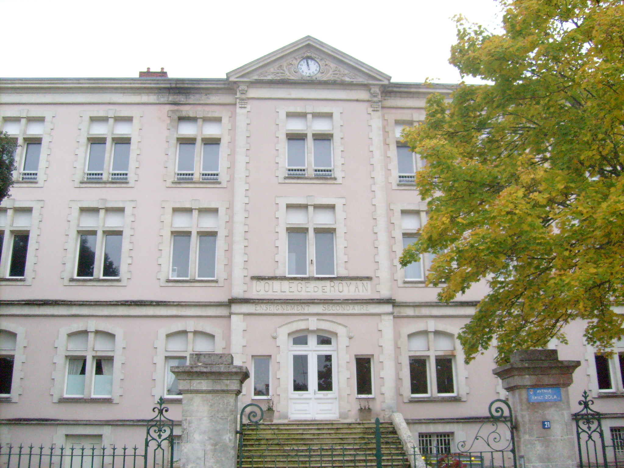 Collège Emile Zola Royan